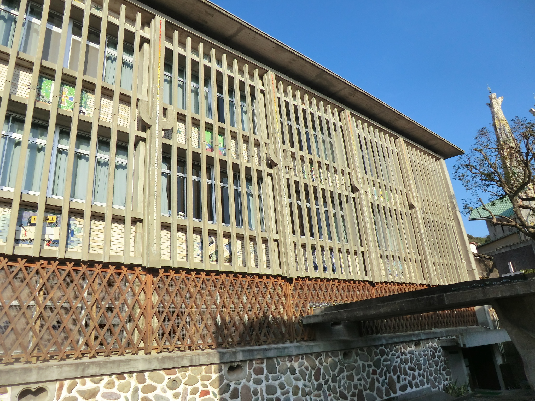 2014年12月に撮影した日本二十六聖人記念館正面